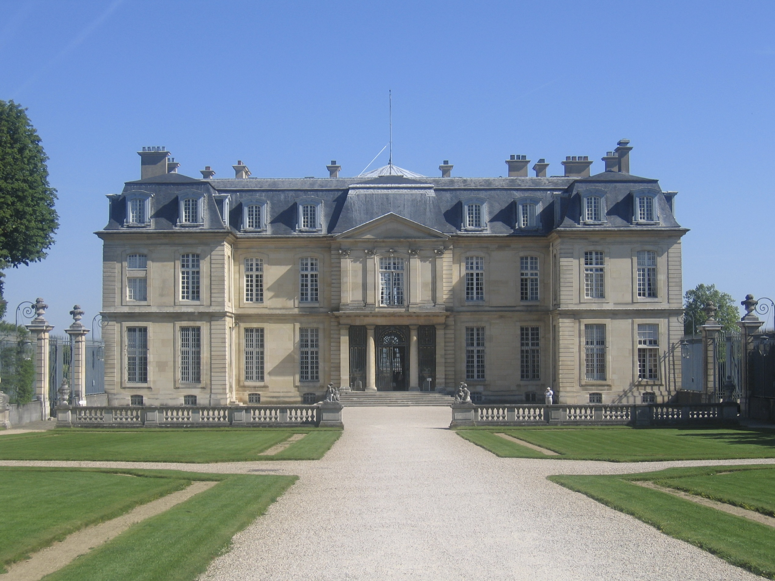 Le Château de Champs-sur-Marne (France), vu de l'extérieur du parc.